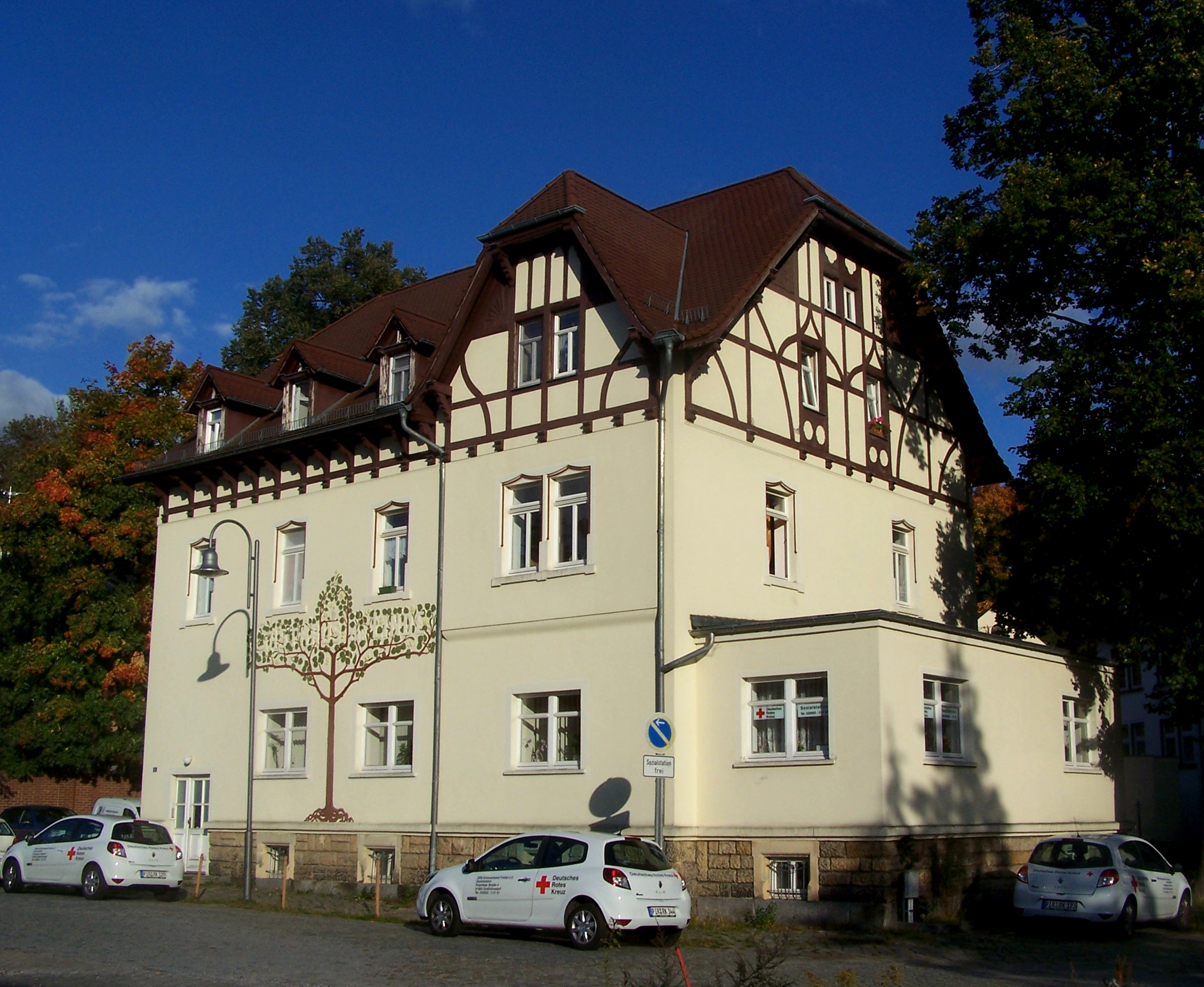 Großröhrsdorf, Pulsnitzer Str. 4